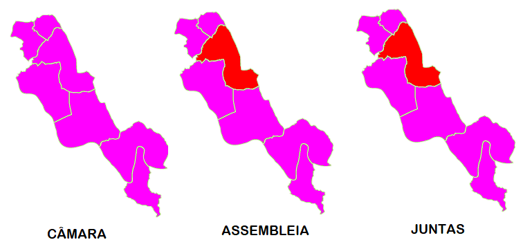 Mapa ilustrativo do partido mais votado por freguesia em Gondomar (2017)